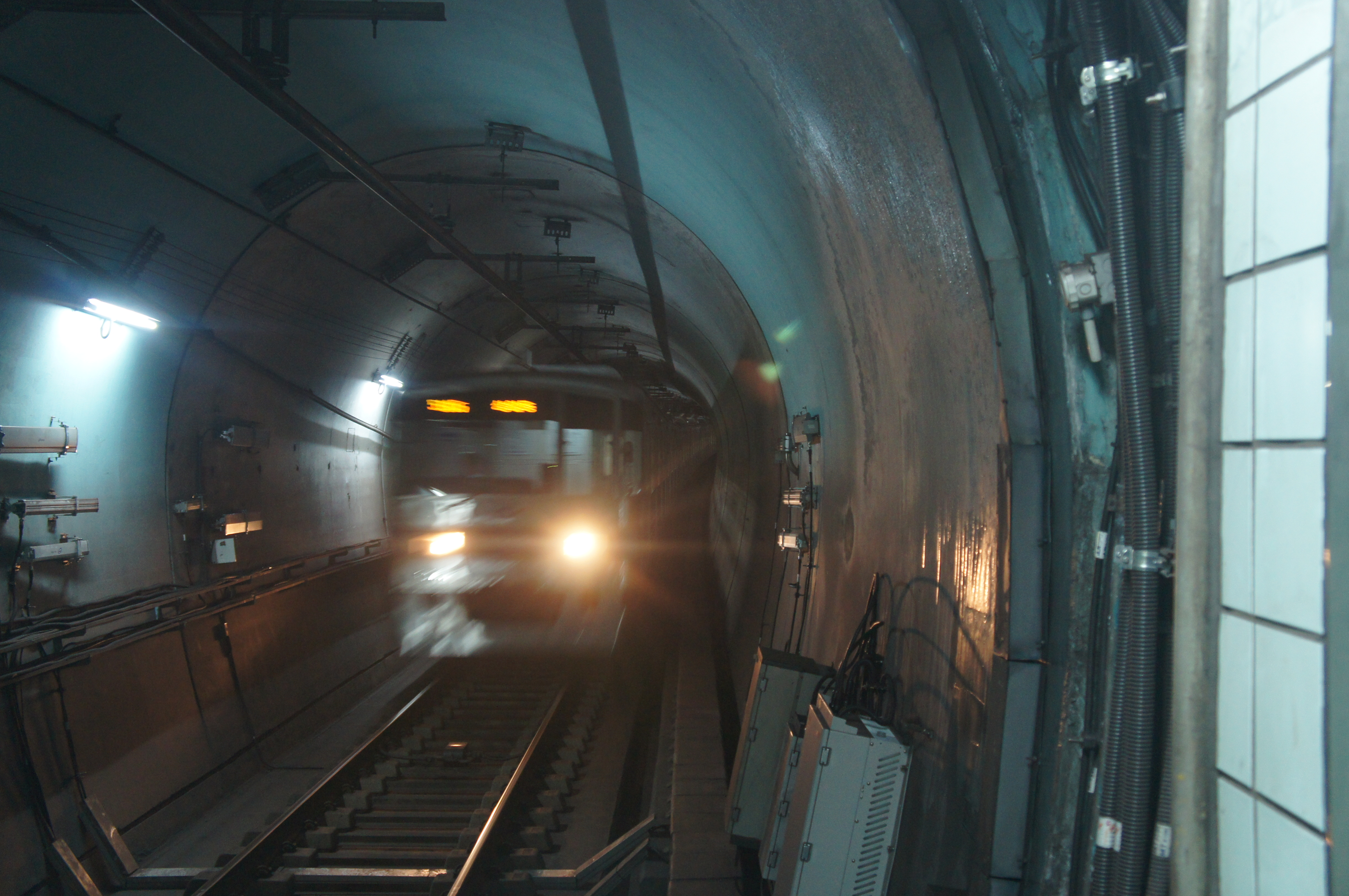 여의나루역으로 진입하는 5호선 전동차